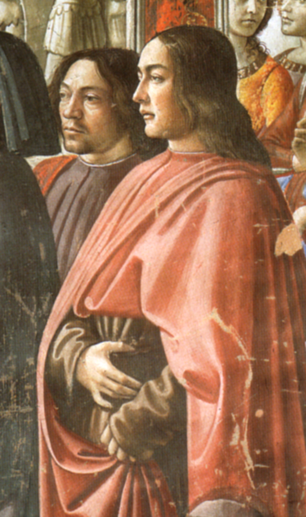 Domenico ghirlandaio, autoritratto (left) con sebastiano mainardi (right) cappella Tornabuoni, annuncio dell'angelo a zaccaria, detail